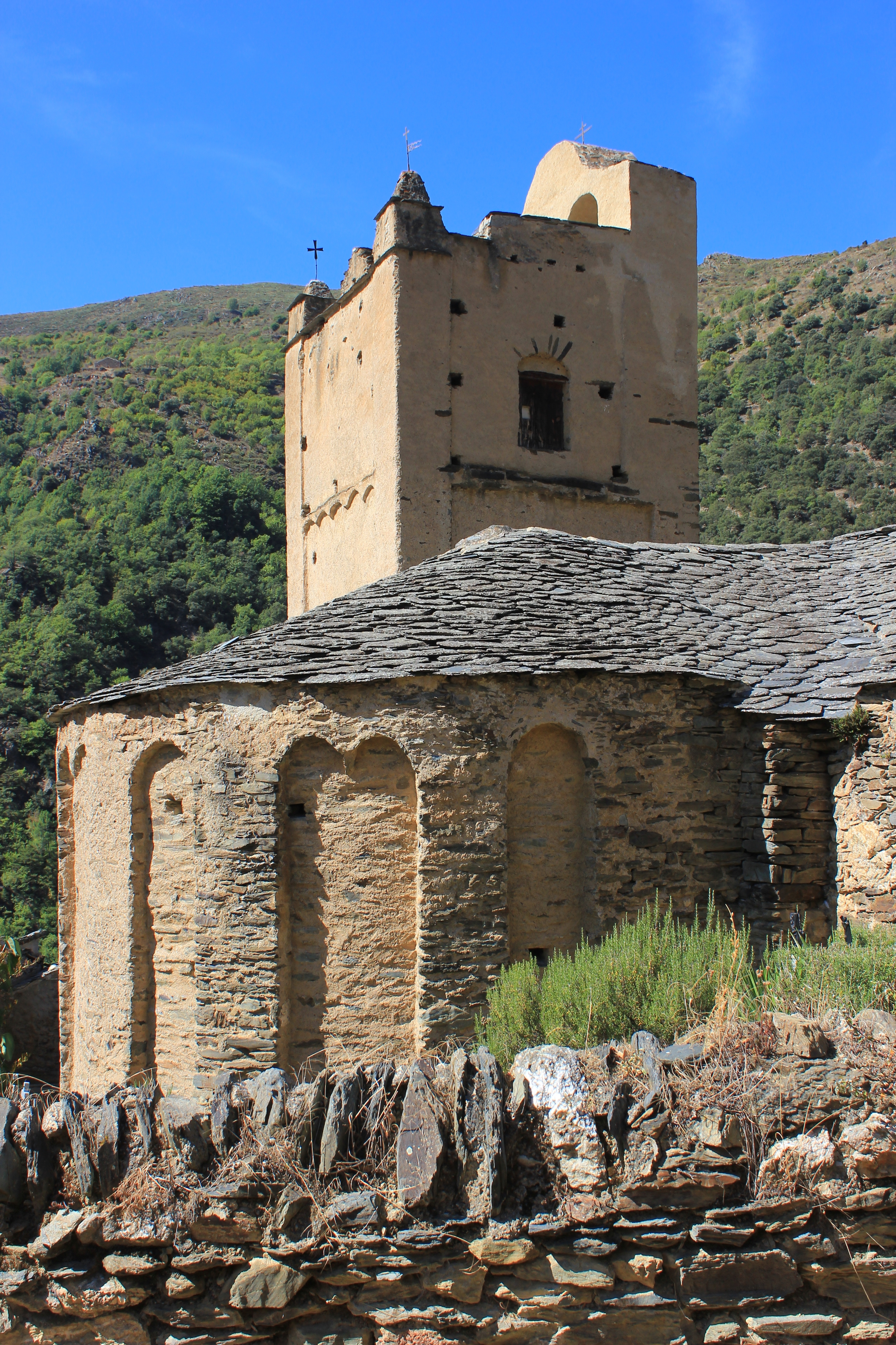 Evol-France Pyrénées orientales Un des plus beaux villages de France